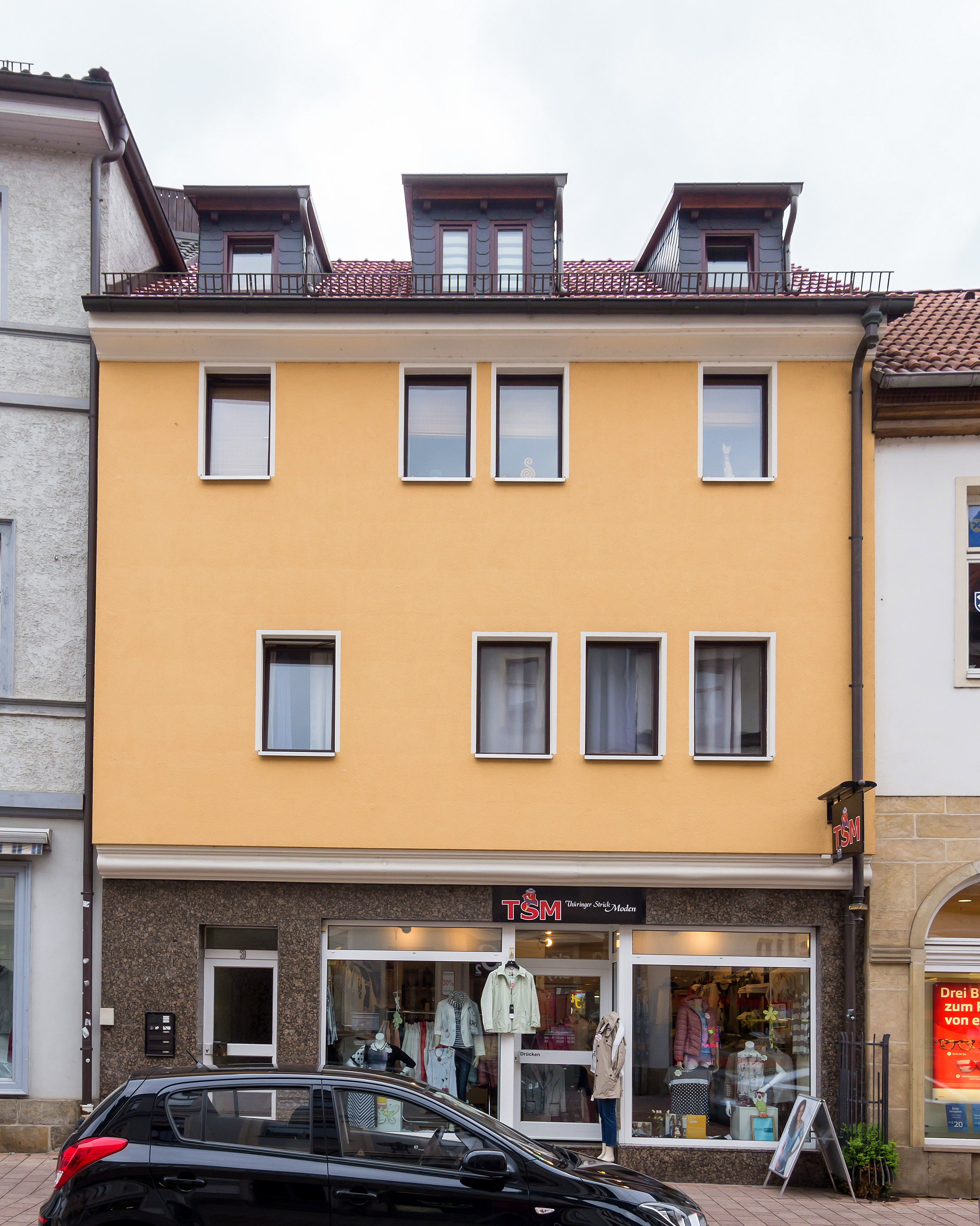 Saalfeld Saalstraße 3 Wohn- und Geschäftshaus (ehem. Fleischbänke) I